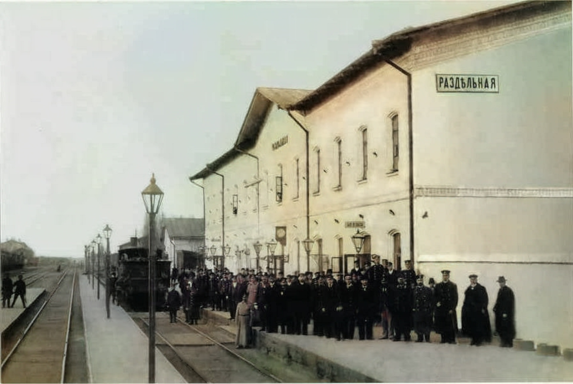 Відкриття будівлі залізничного вокзалу станції "Роздільна"